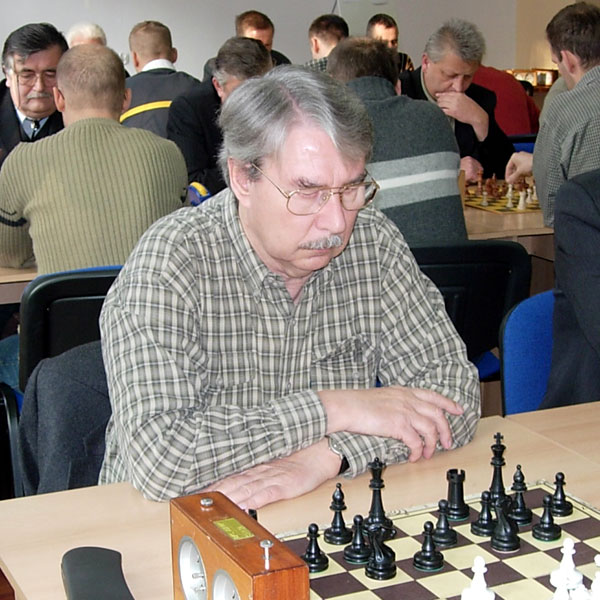 Włodzimierz Schmidt, Bydgoszcz 2006